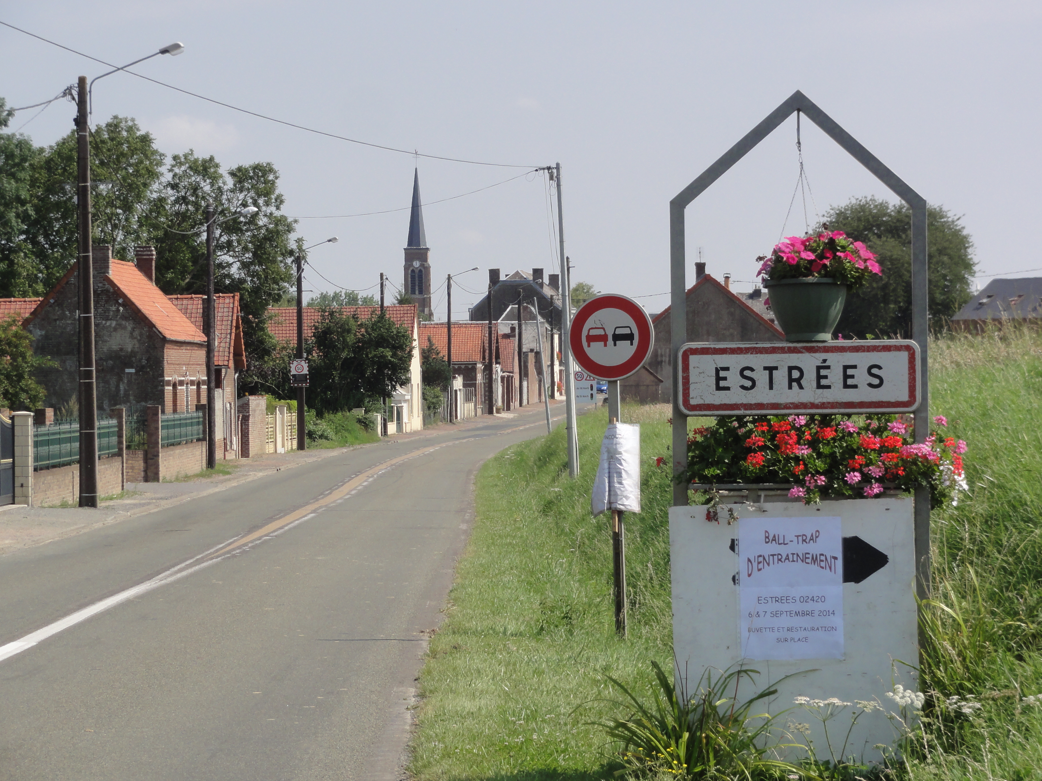 Estrées (Aisne) city limit sign